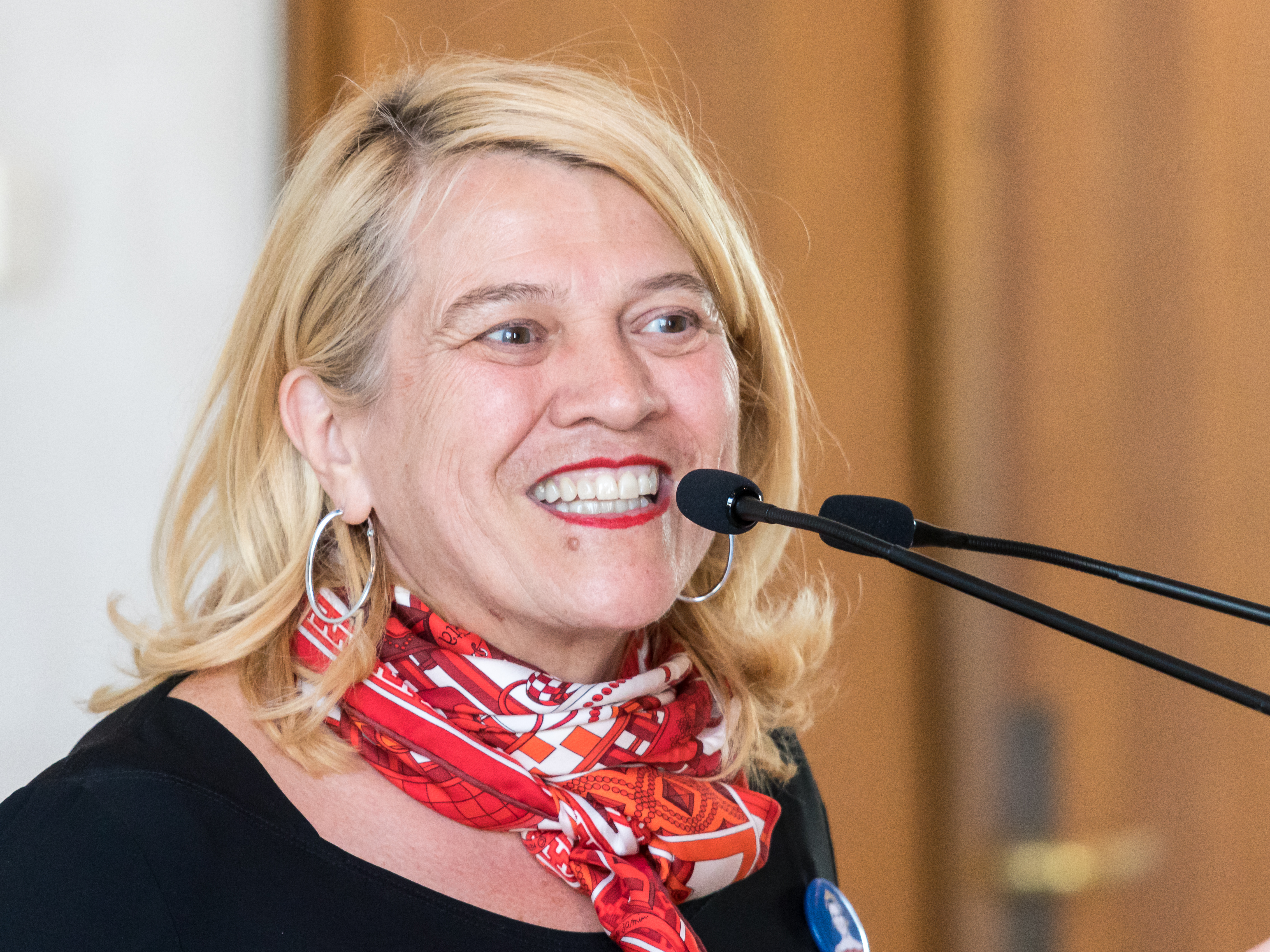 Empfang für Dr. Alfred Biolek zum 85. Geburtstag durch Kölns Oberbürgermeisterin im Muschelsaal des Historischen Rathauses von Köln Foto: Die Köchin Léa Linster gratuliert zum Geburtstag und erinnert an gemeinsame Zeiten